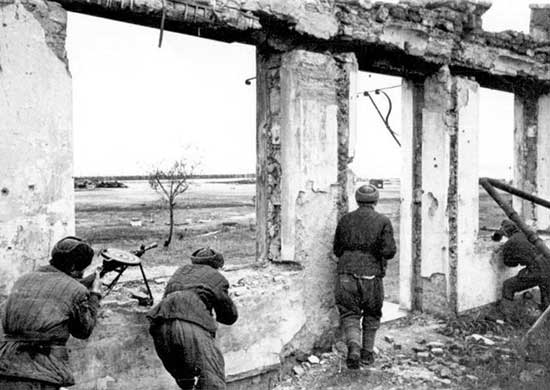 Бой советских десантников на окраине Керчи в ходе Керченско-Эльтигенской десантной операции. Ноябрь 1943 года.